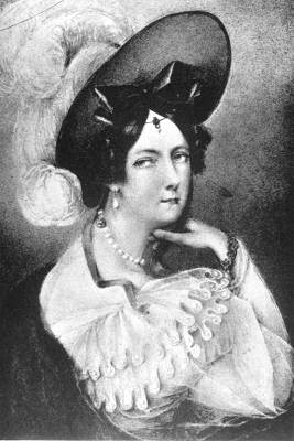 Self-portrait